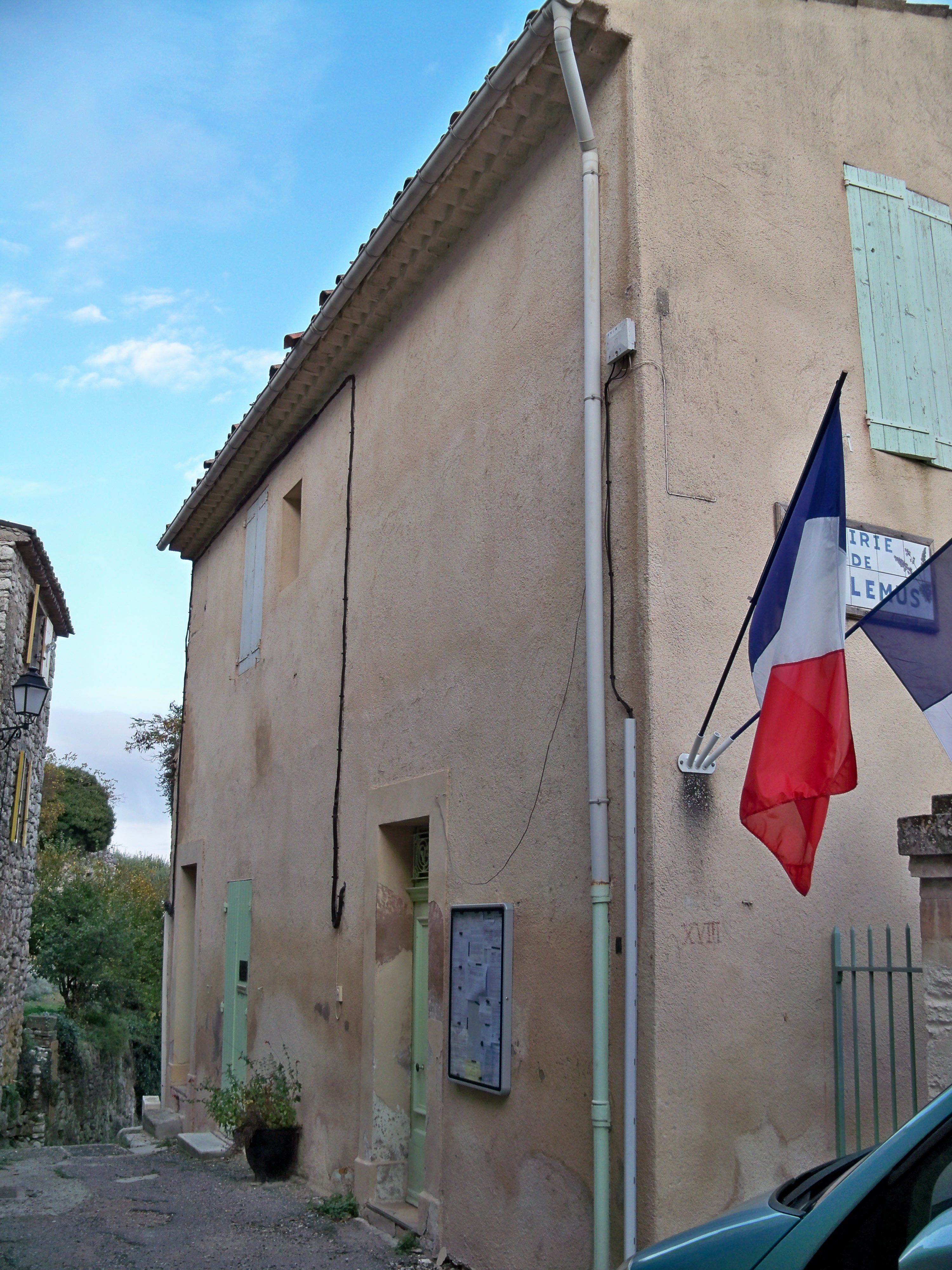 Mairie de Villemus (04)